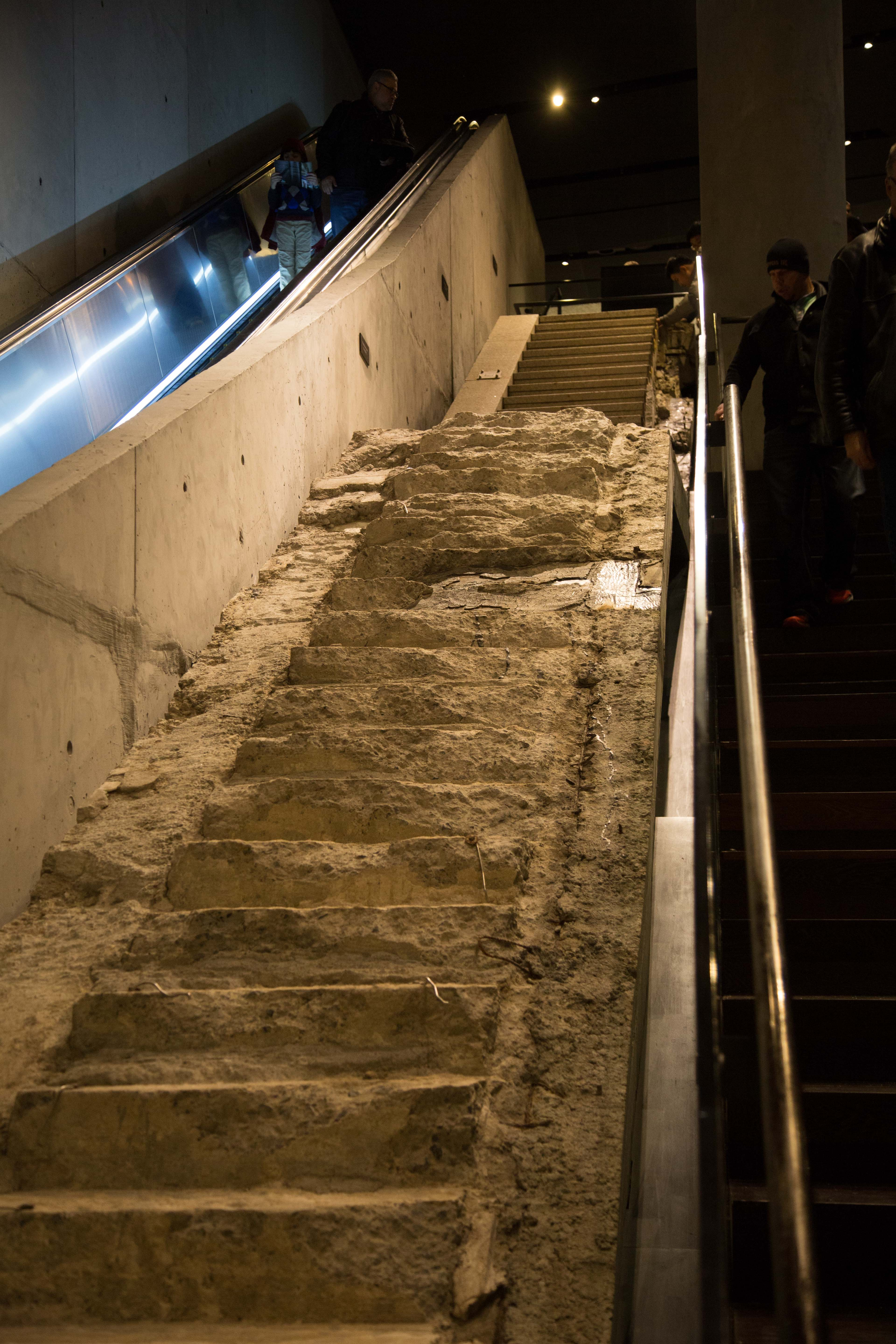 A81A5207-22